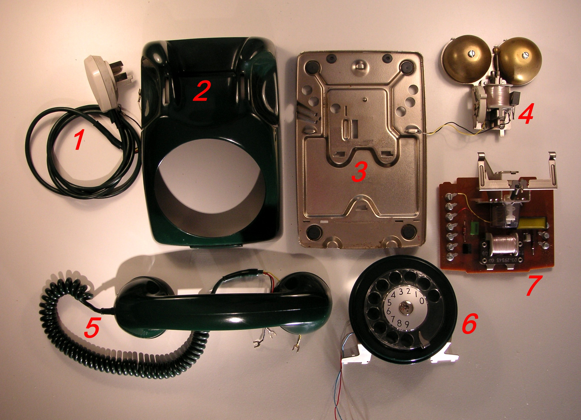 Dialog delar: anslutningskabel (1), kåpa (2), bottenplatta (3), ringklocka (4), lur (5), fingerskiva (6), elektonikenhet med klykfunktion (7)